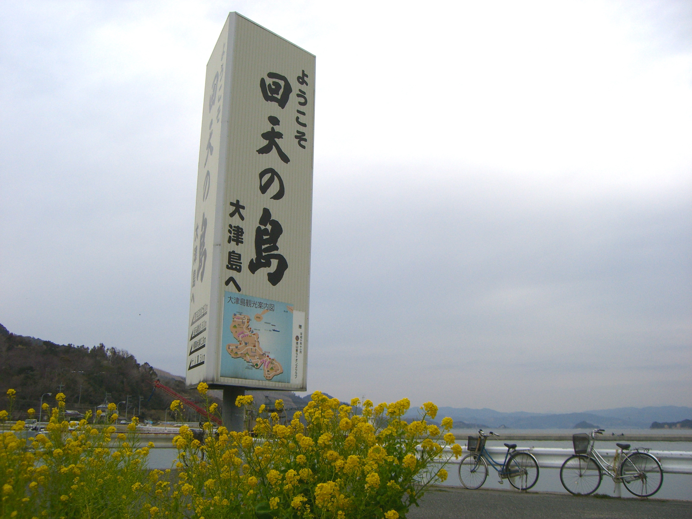 周南市大津島